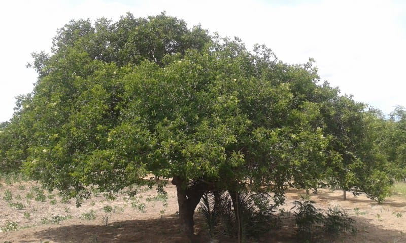 Spondias tuberosa L., popularmente conhecido como umbuzeiro, imbuzeiro ou jique é uma árvore de pequeno porte (mede até seis metros de altura), pertencente à família das anacardiáceas, de copa larga (até quinze metros de largura), originária dos chapadões semiáridos do Nordeste brasileiro